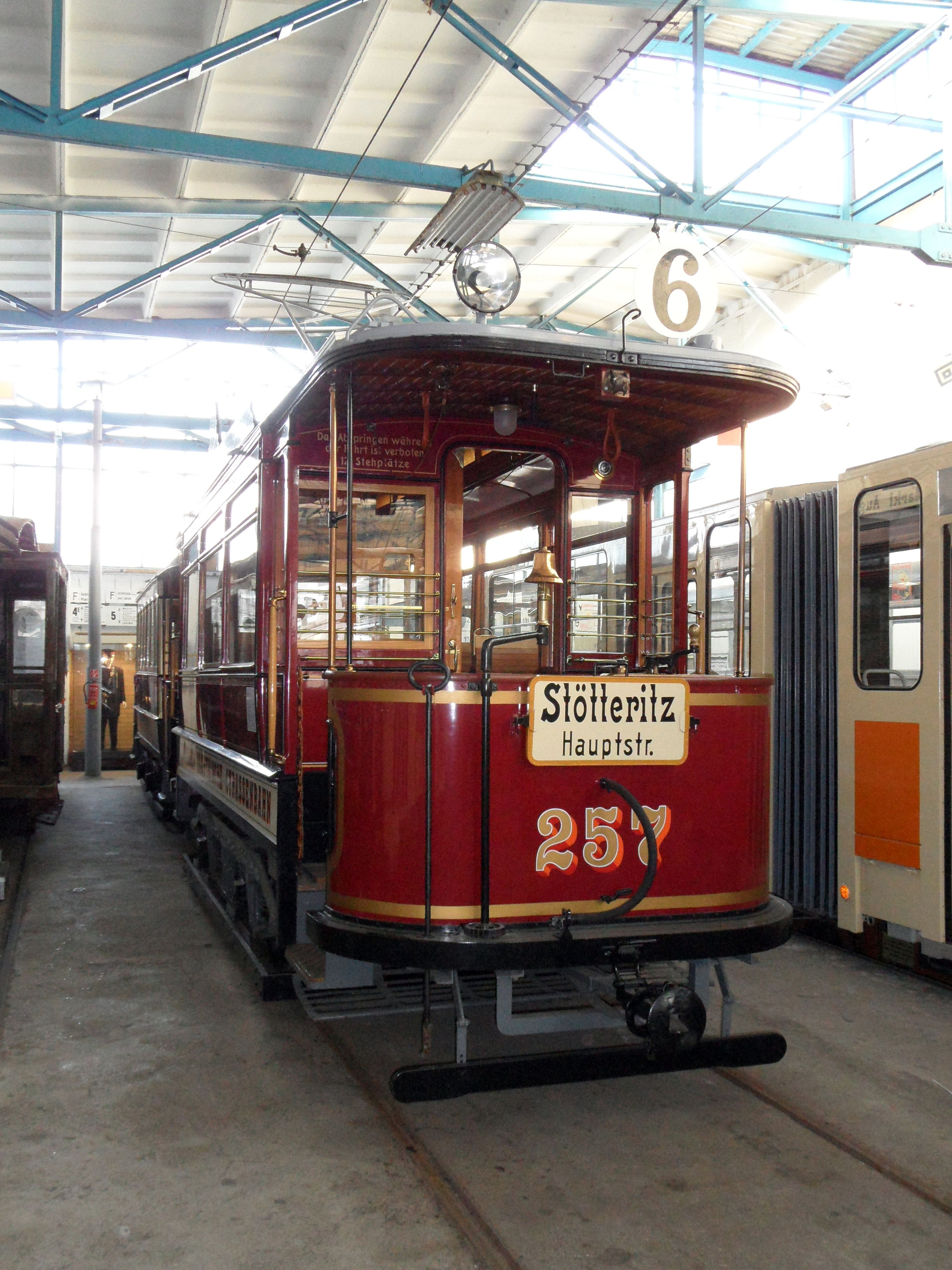 In den (fast)Lieferzustand zurückversetzter Triebwagen der »Leipziger Elektrischen Straßenbahn«, späterer Typ 16, Baujahr 1909, kurz nach der Fertigstellung im glänzenden Neulack.